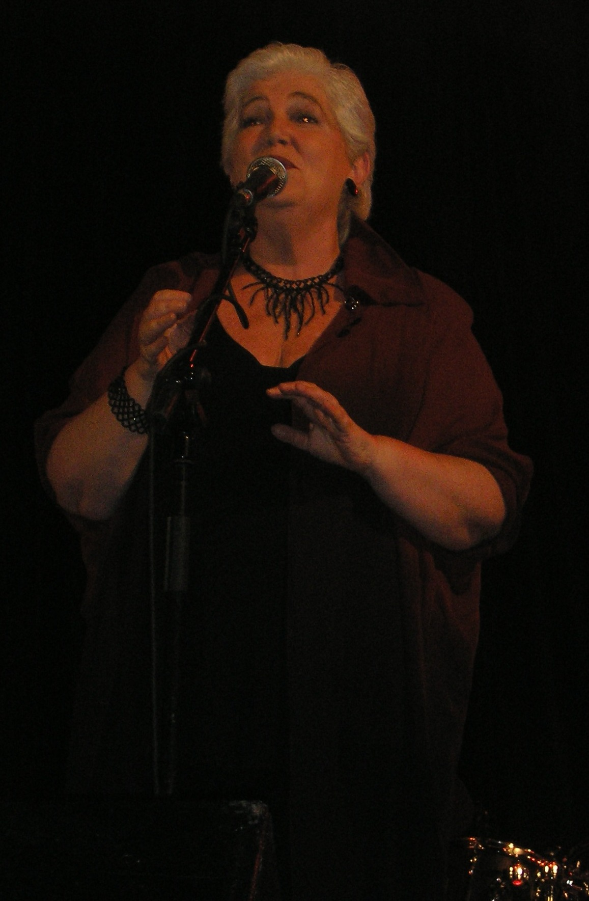 Izaskun Uranga, miembro de Mocedades